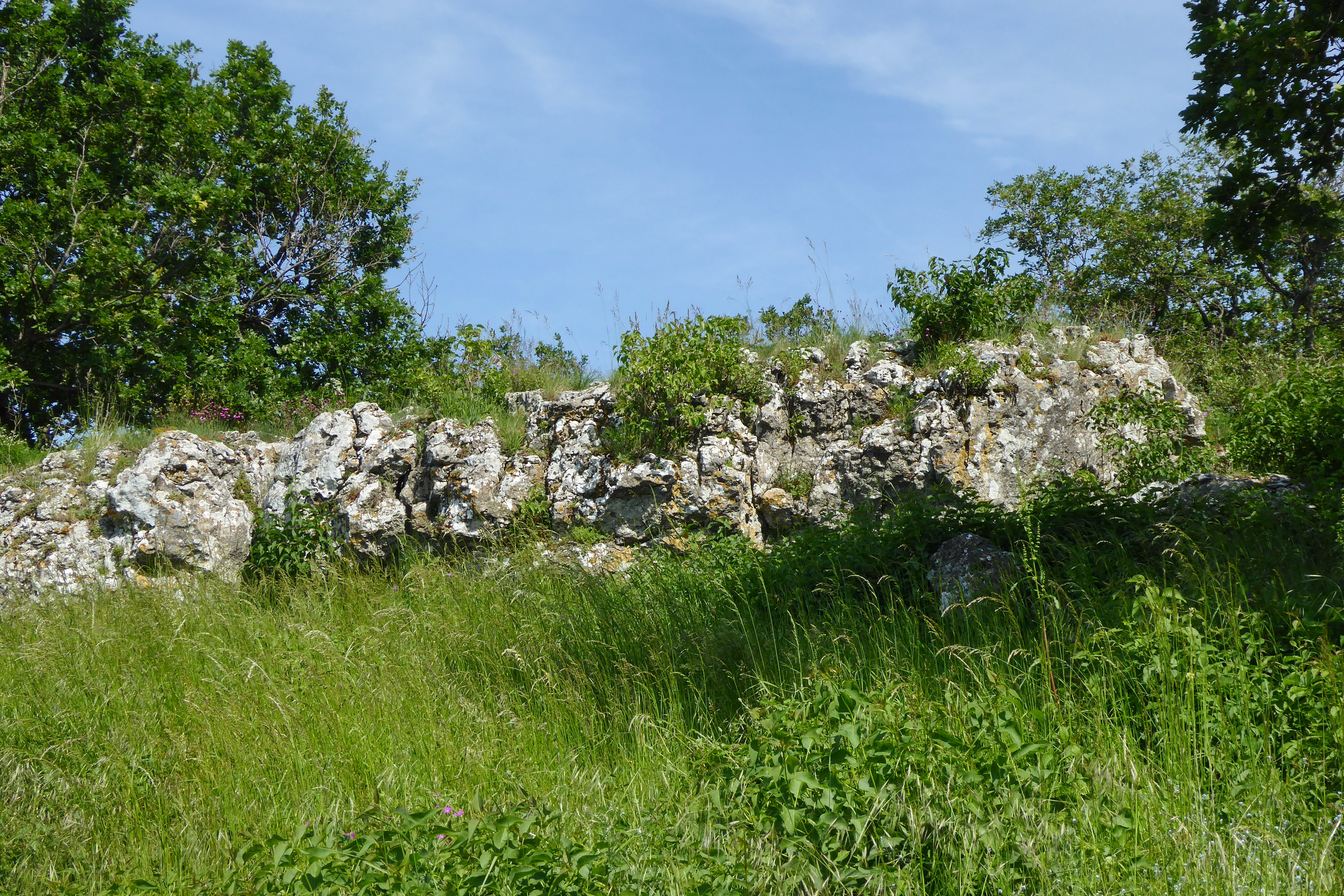 Das Naturschutzgebiet Goldberg weist dort, wo es Felsaustritte gibt, eine natürliche Trockenvegetation auf. This media shows the nature reserve in the Burgenland with the ID 1014.